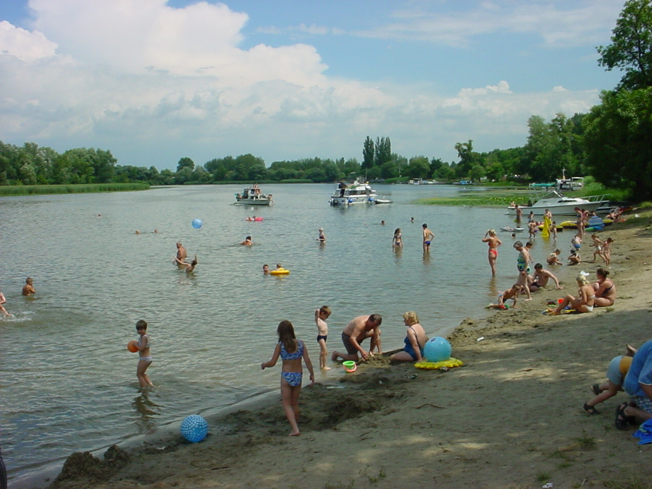 Fürdőhely